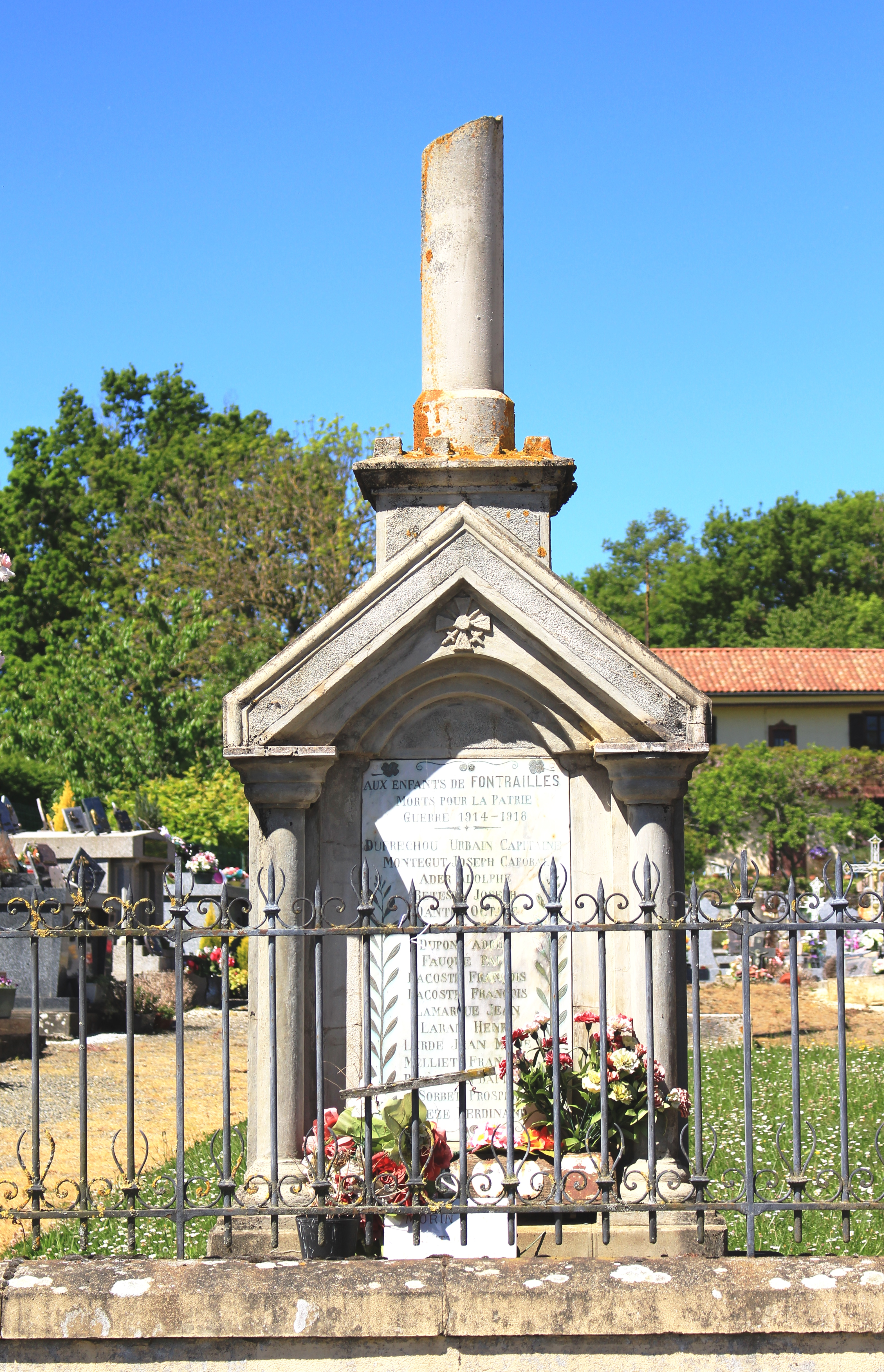 Monument aux morts de Fontrailles (Hautes-Pyrénées)